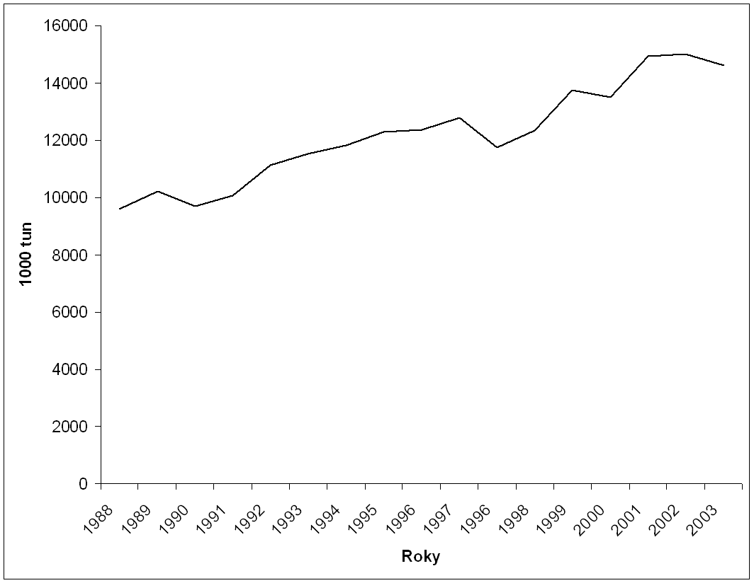 Vývoj světové produkce ananasu (1988-2003) dle FAO